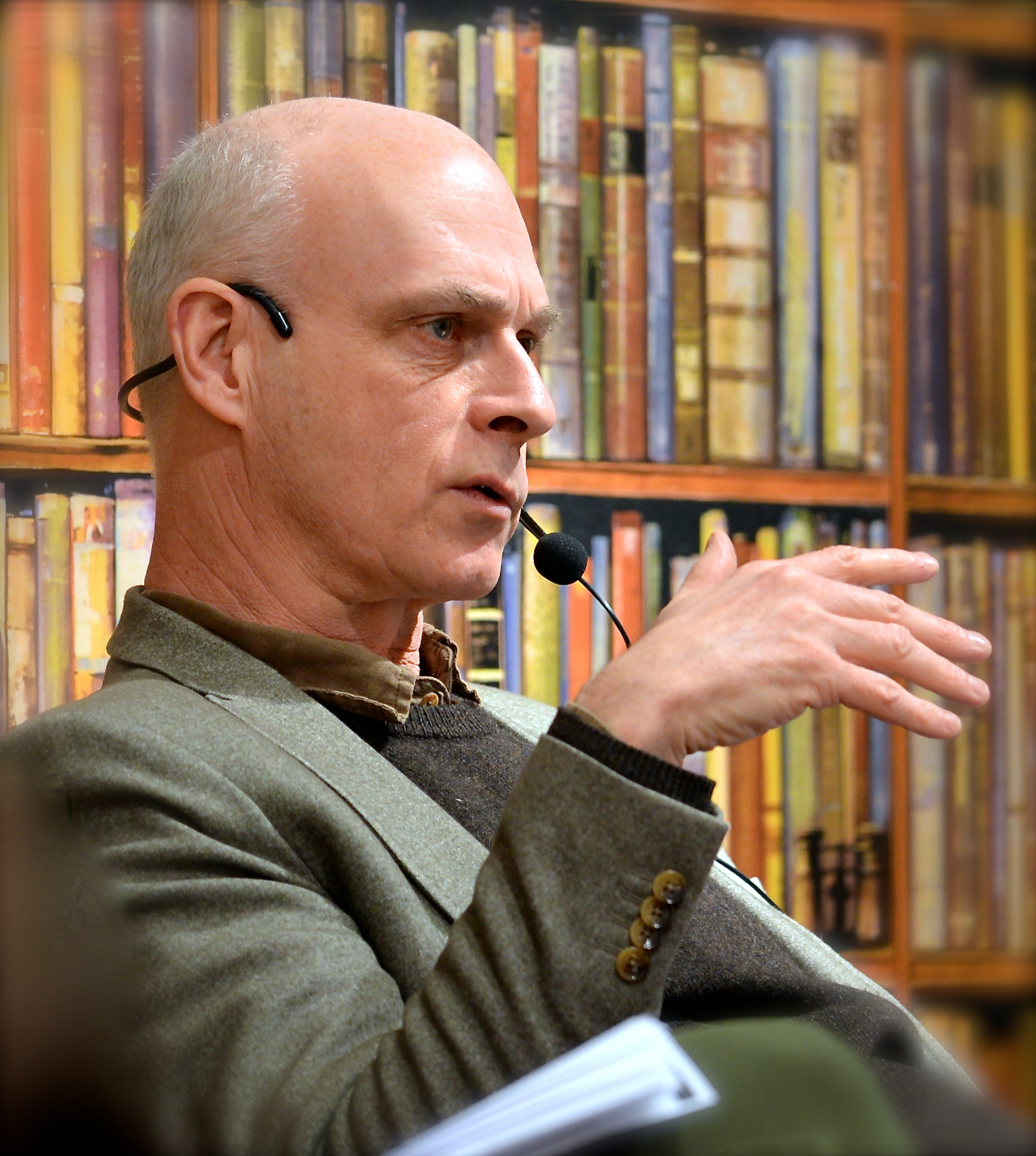 Elin Klinga, Magnus Florin och Hans Klinga från Dramaten samtalar om pjäsen Mästaren och Margarita på Akademibokhandeln på Mäster Samuelsgatan i Stockholm den 29 januari 2014.